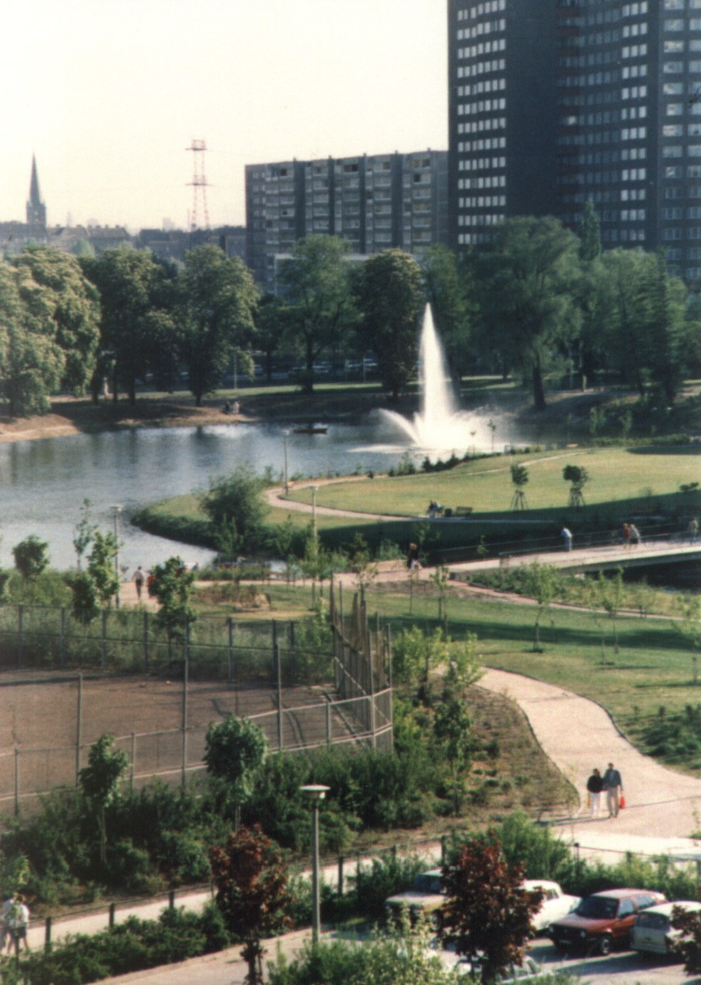 Blick auf Fennpfuhlpark im Sommer 1989